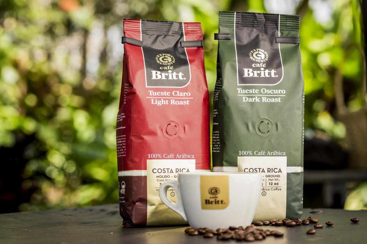 Café gourmet de Costa Rica, de las mejores zonas de producción.